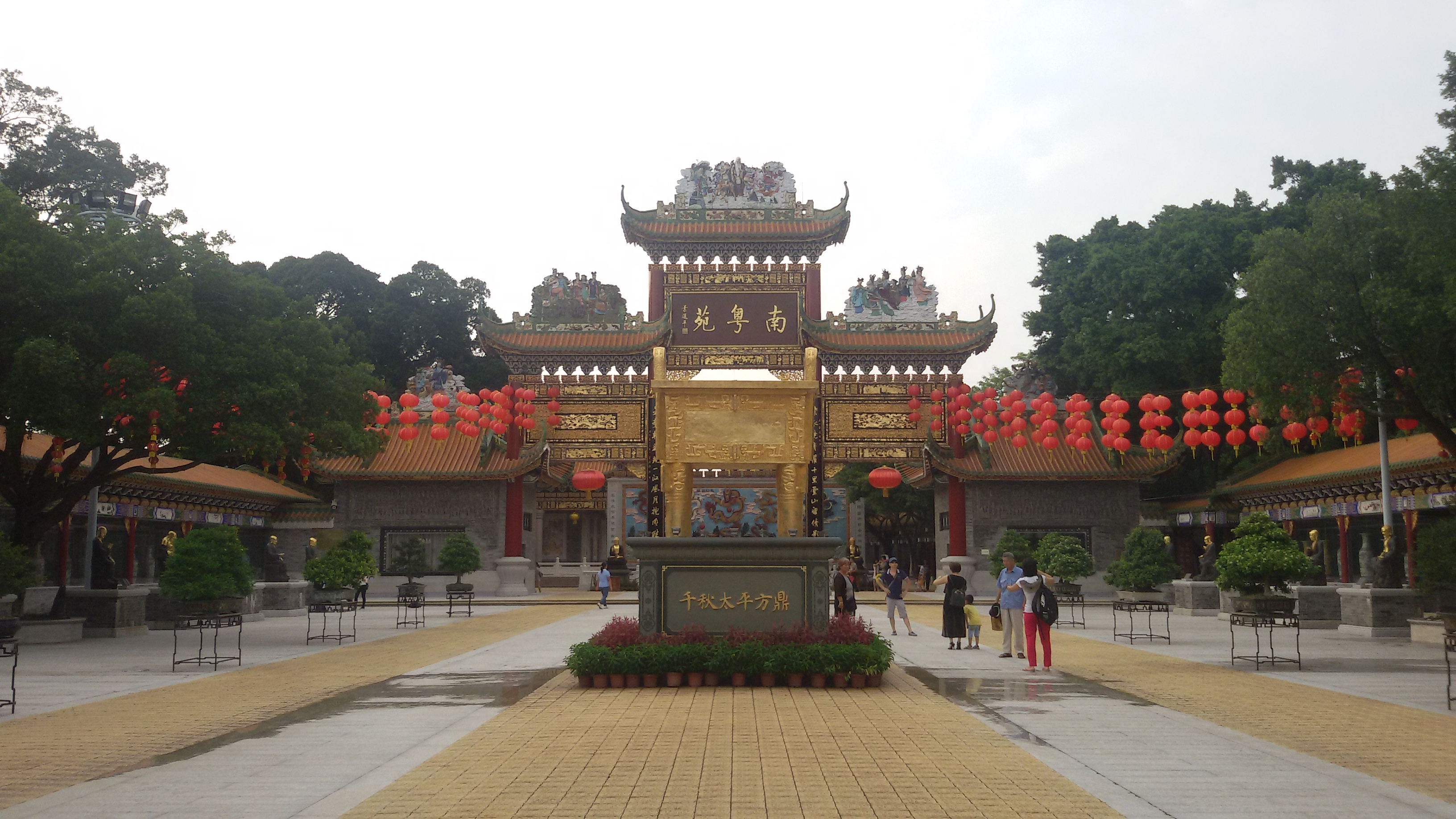 粵語: 南粵苑